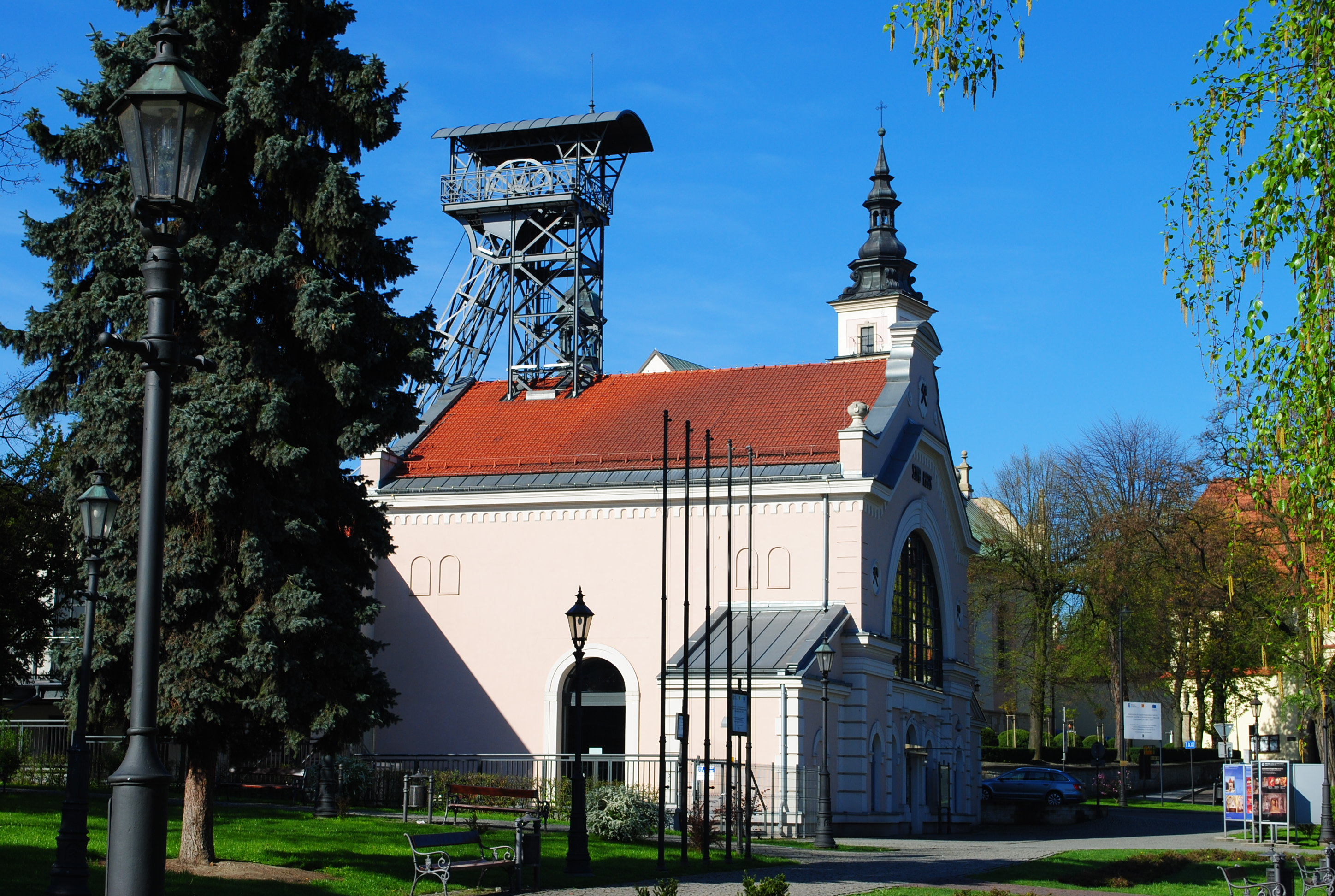 Wieliczka. Szyb Regis